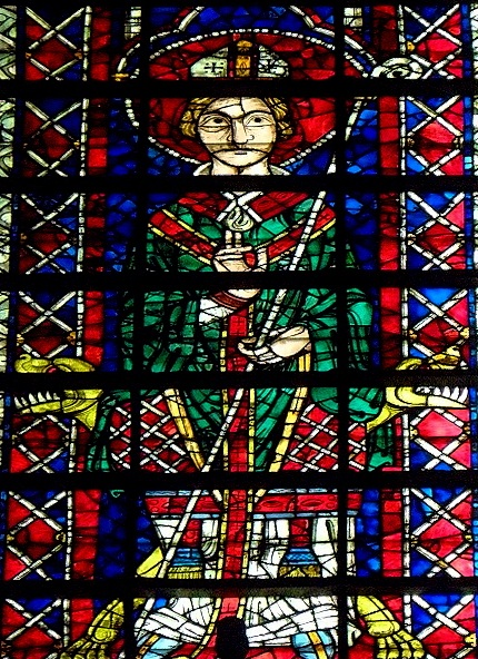 Lancette gauche de la baie 118 de la cathédrale Notre-Dame de Reims (51).